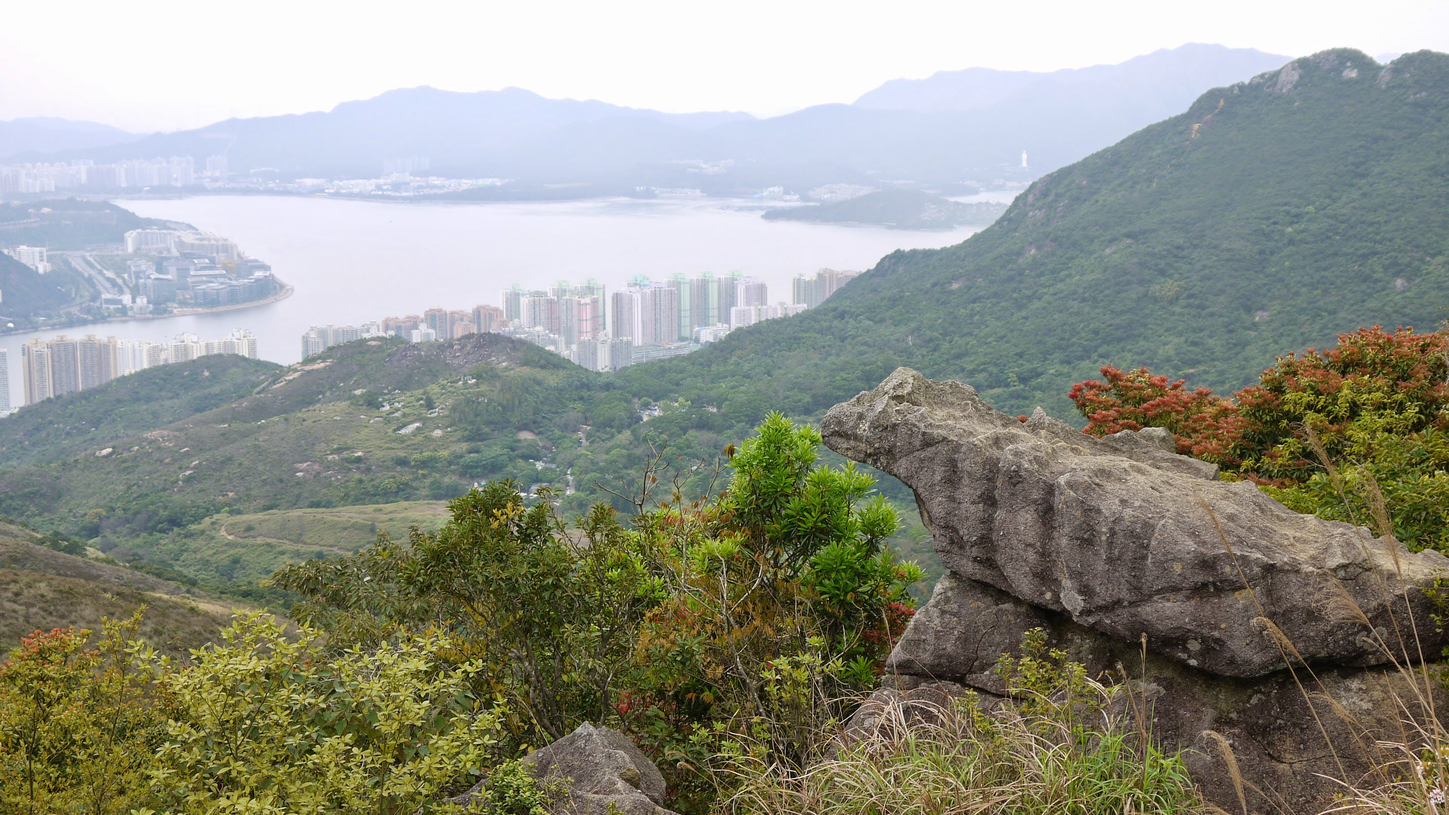 蜥蜴望海石